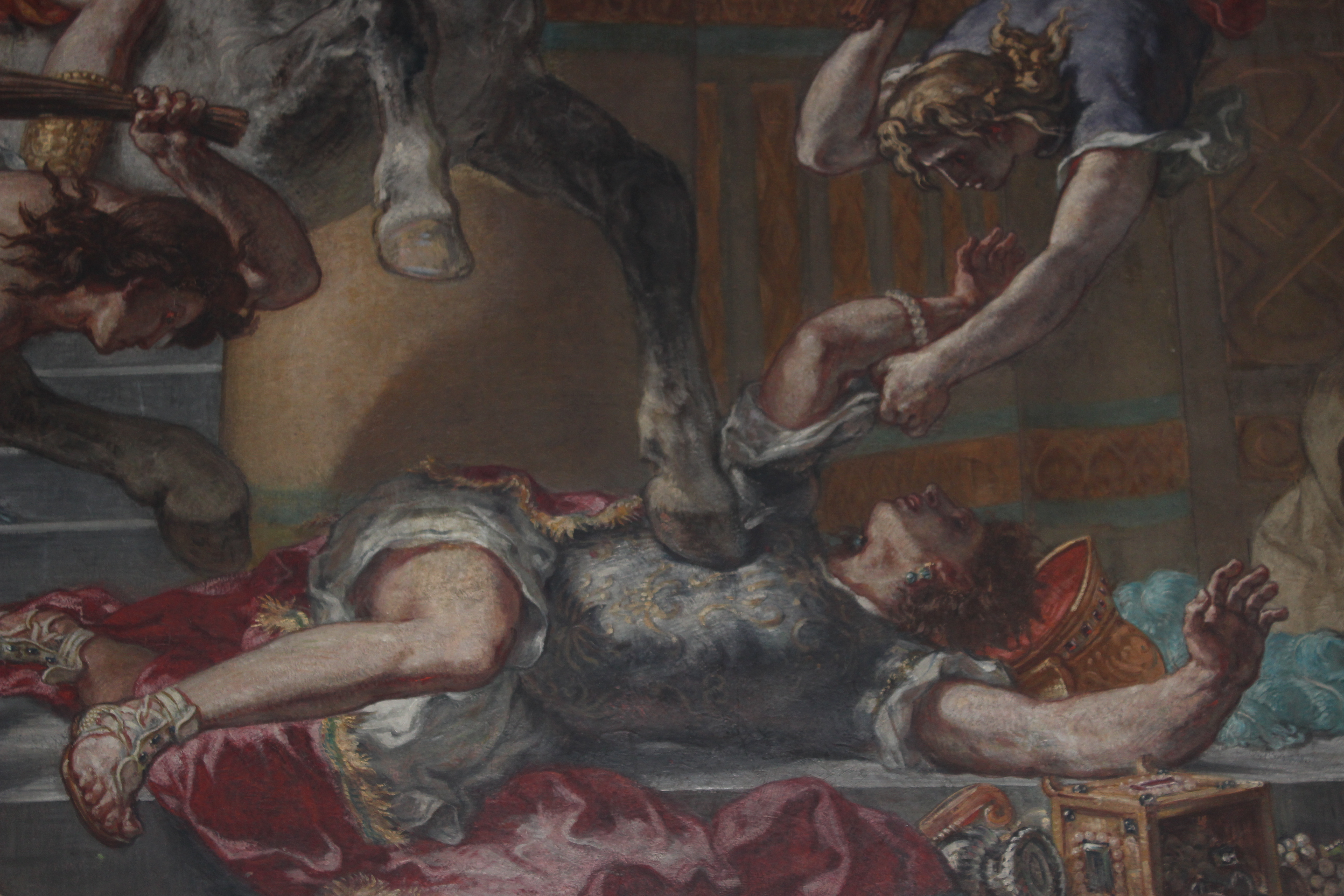 E. Delacroix. Heliodoro expulsado del Templo. París, Saint-Sulpice.